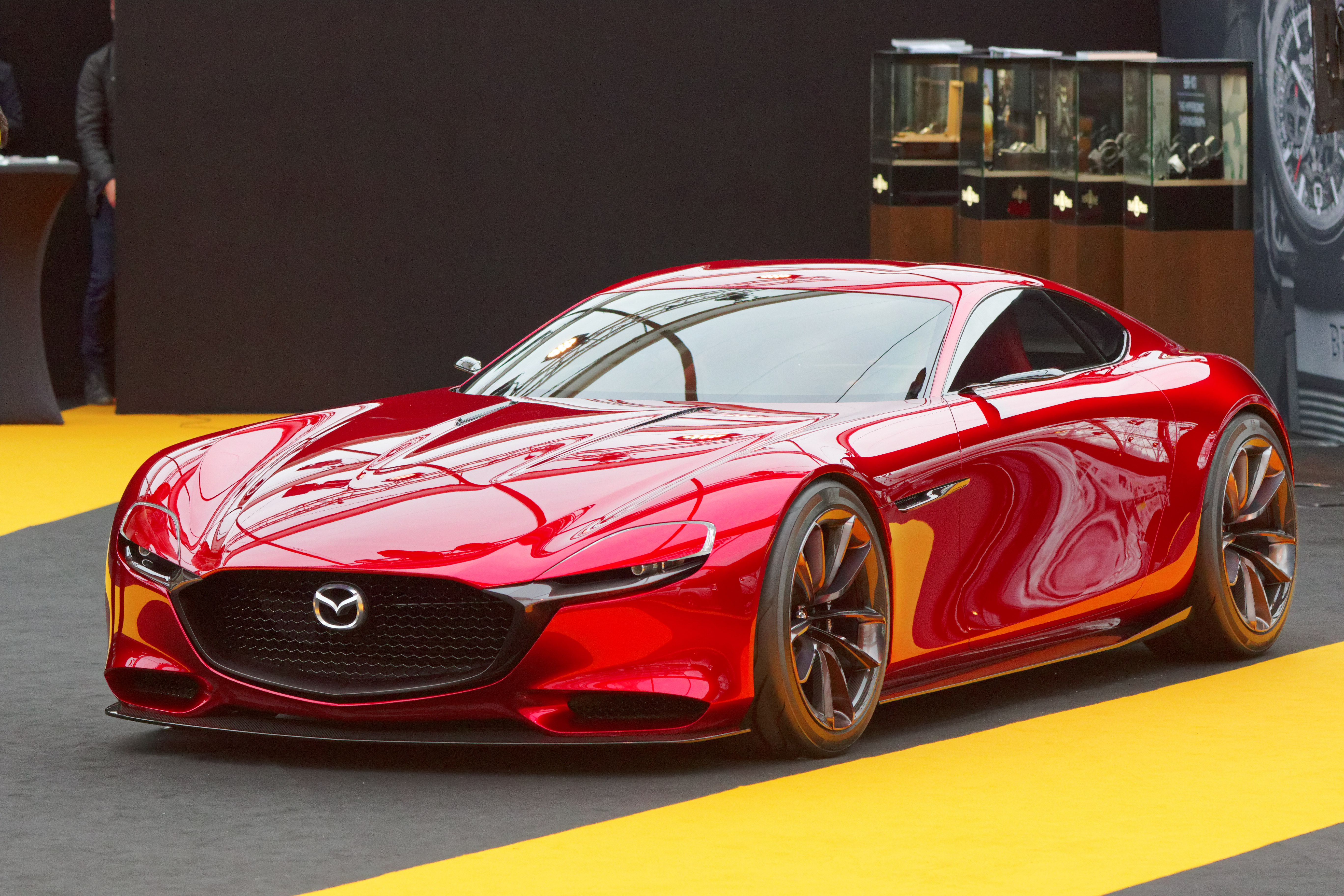 La Mazda RX-Vision exposée lors du festival automobile international 2016.